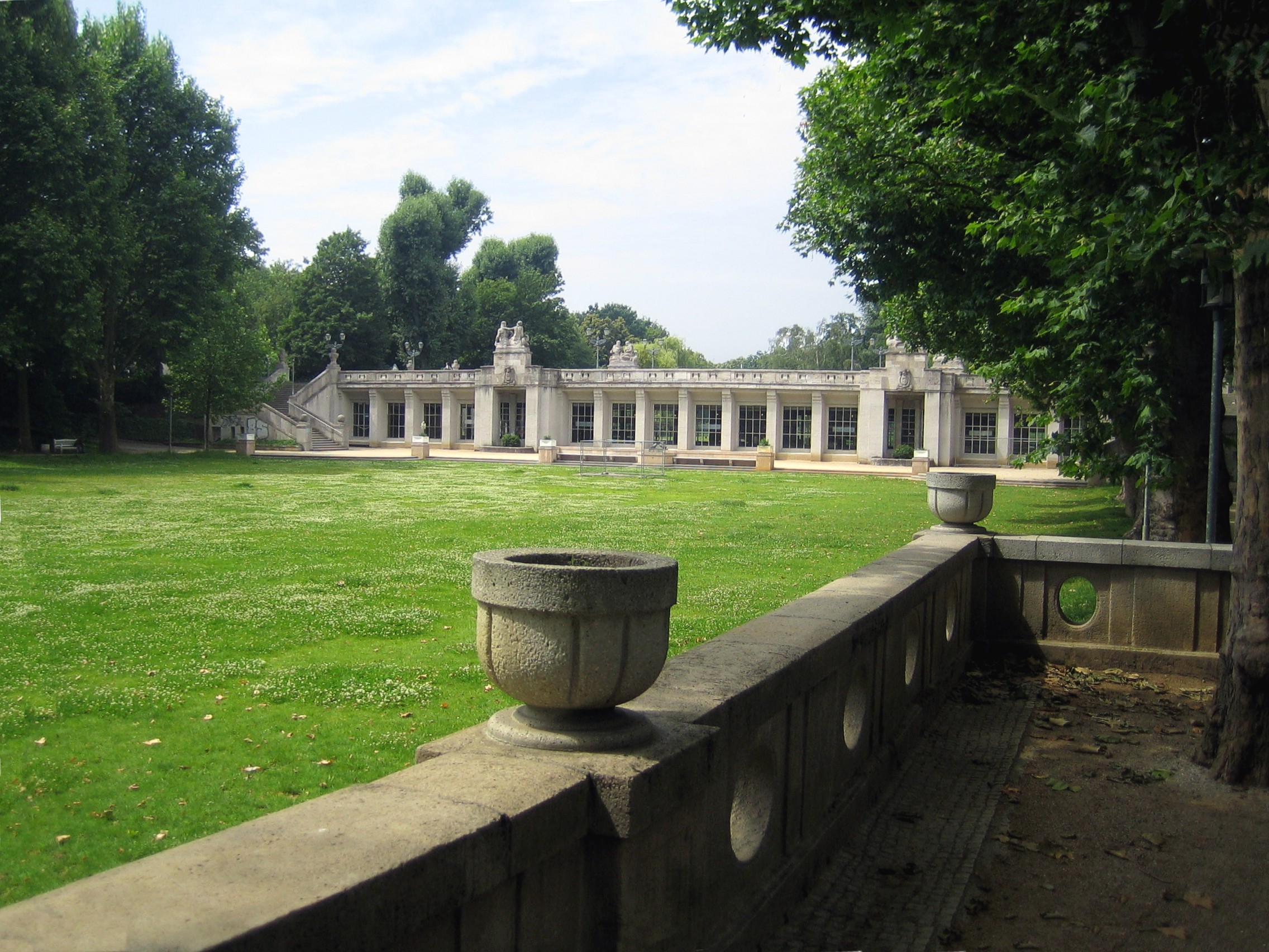 Berlin, Rudolph-Wilde-Park. Blick von Osten zur Carl-Zuckmayer-Brücke mit dem darunter liegenden U-Bahnhof Rathaus Schöneberg.